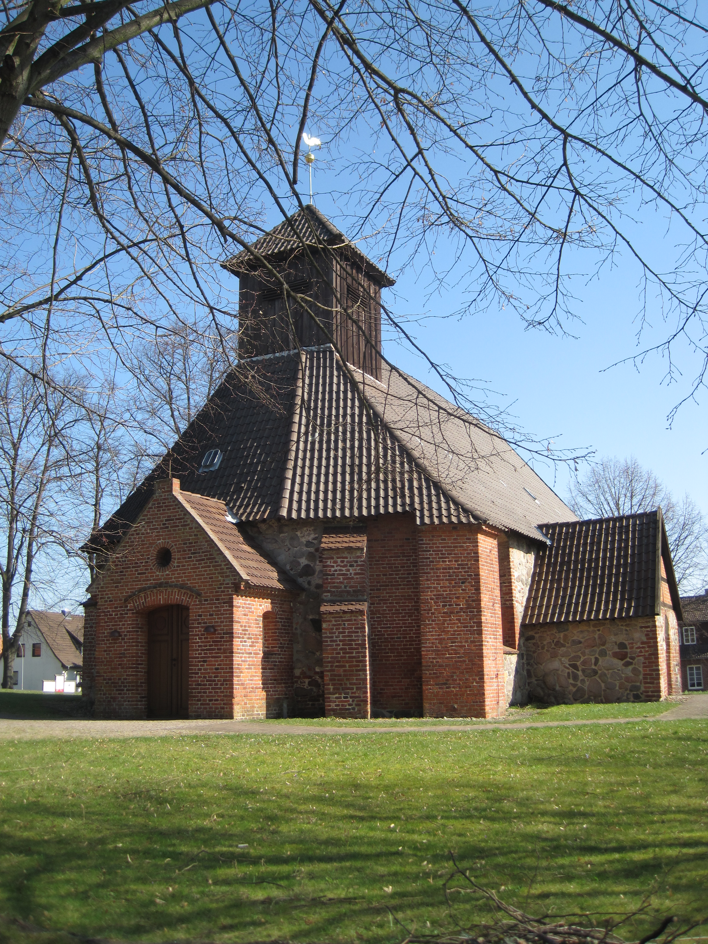 Kirche in Ziethen (Lauenburg) von Westen